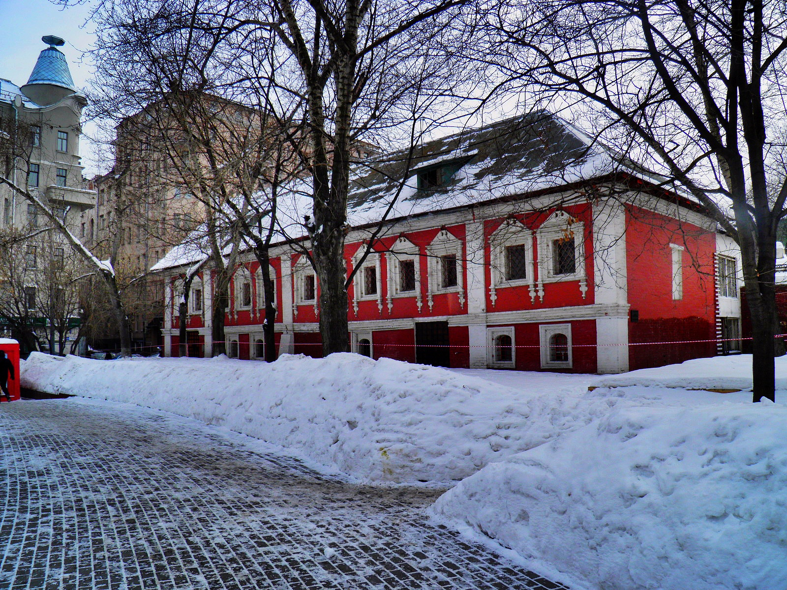 палатыОСТОЖЕНКИ